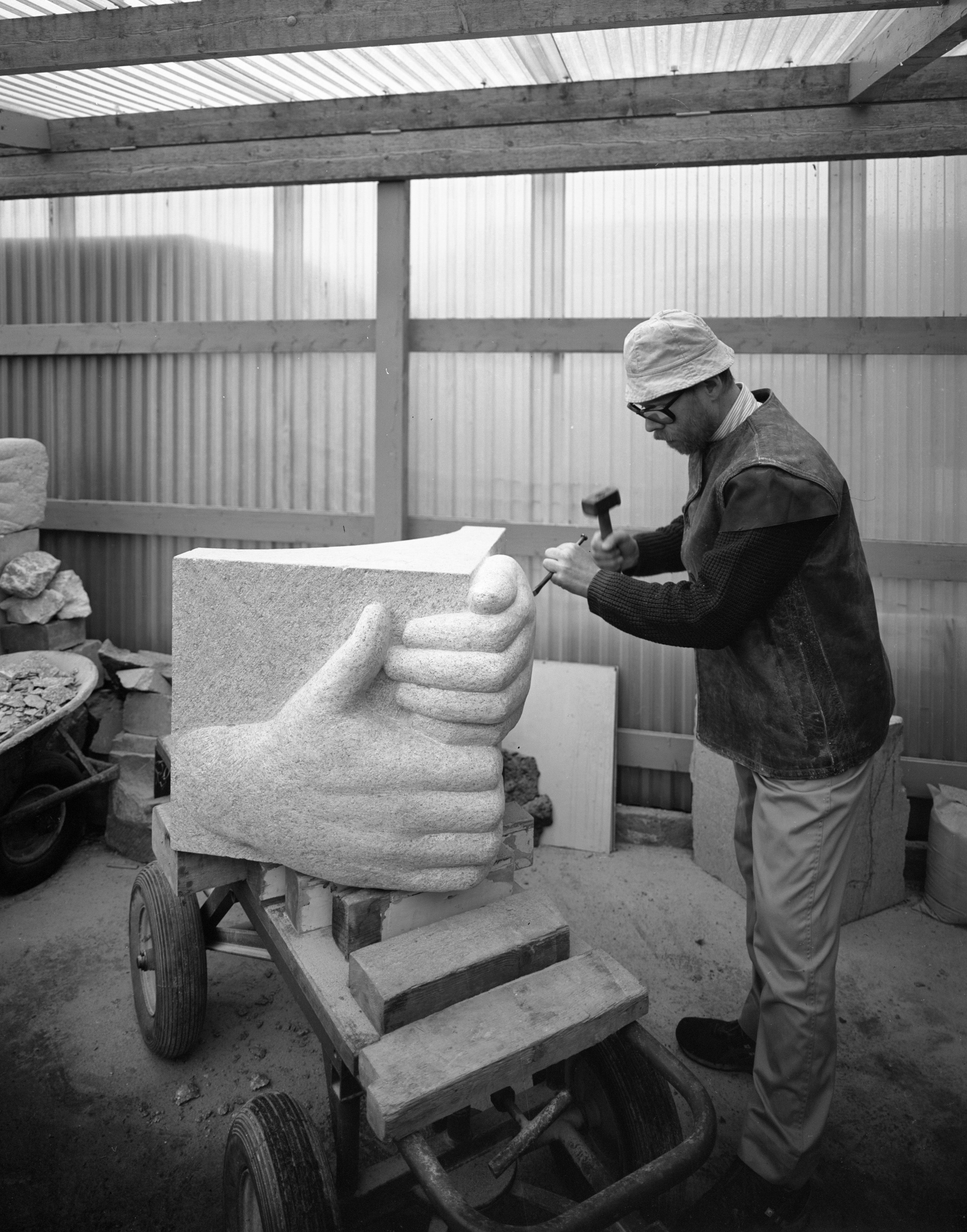 De Utrechtse beeldhouwer Joop Wouters tijdens het werk aan het beeld "handen", in opdracht van woningcorporatie K77.